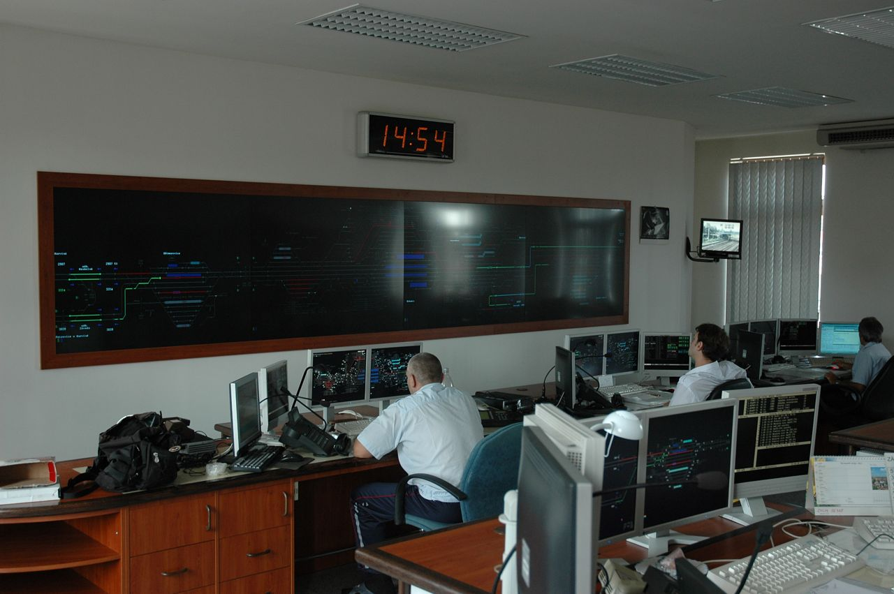 Ústřední stavědlo stanice Bohumín